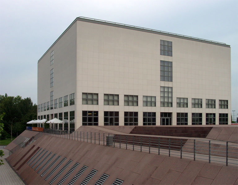 Galerie der Gegenwart , Hamburg. GNU-FDL, selbst fotografiert.